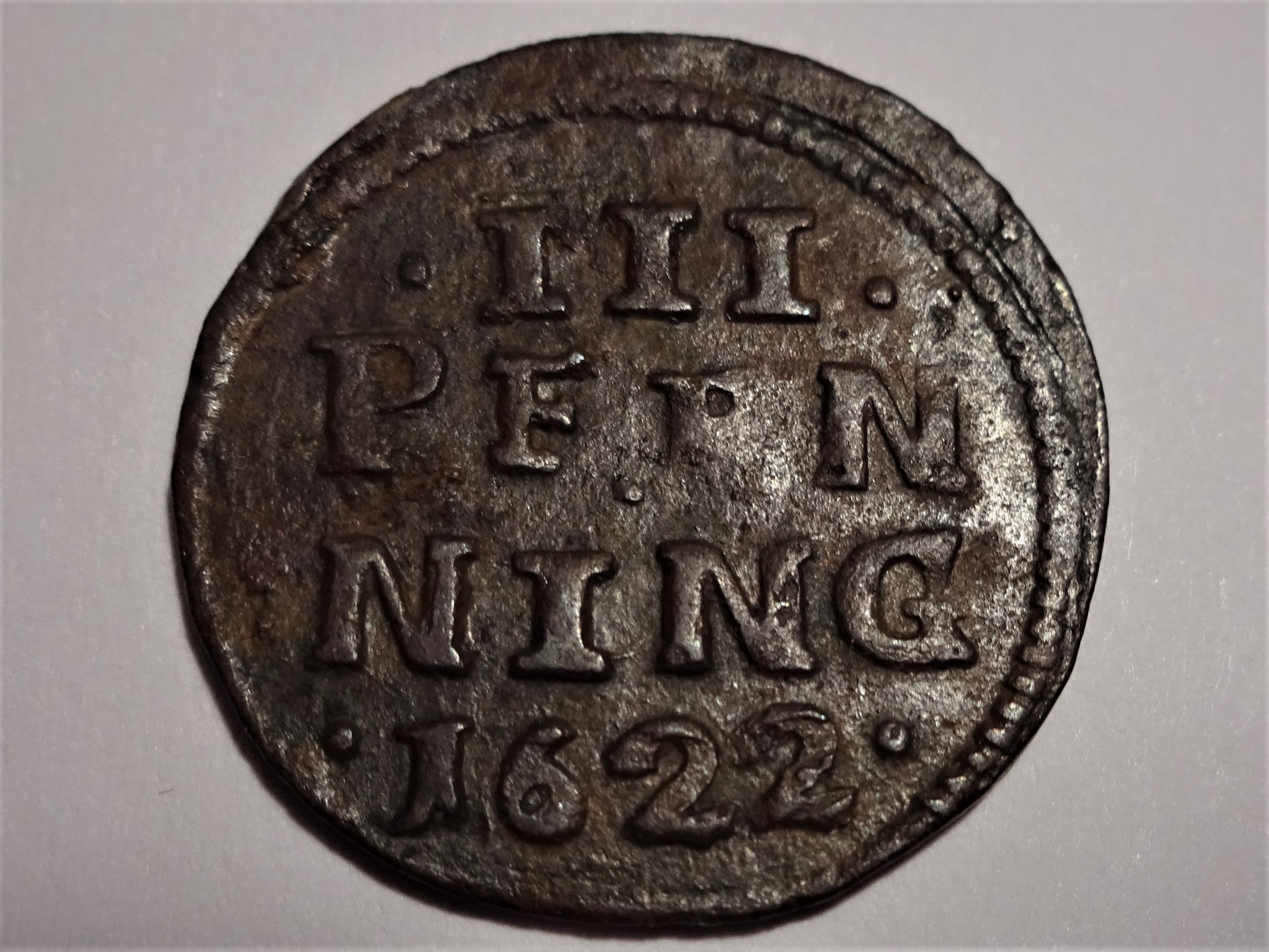 Wertseite: III PFENNING 1622